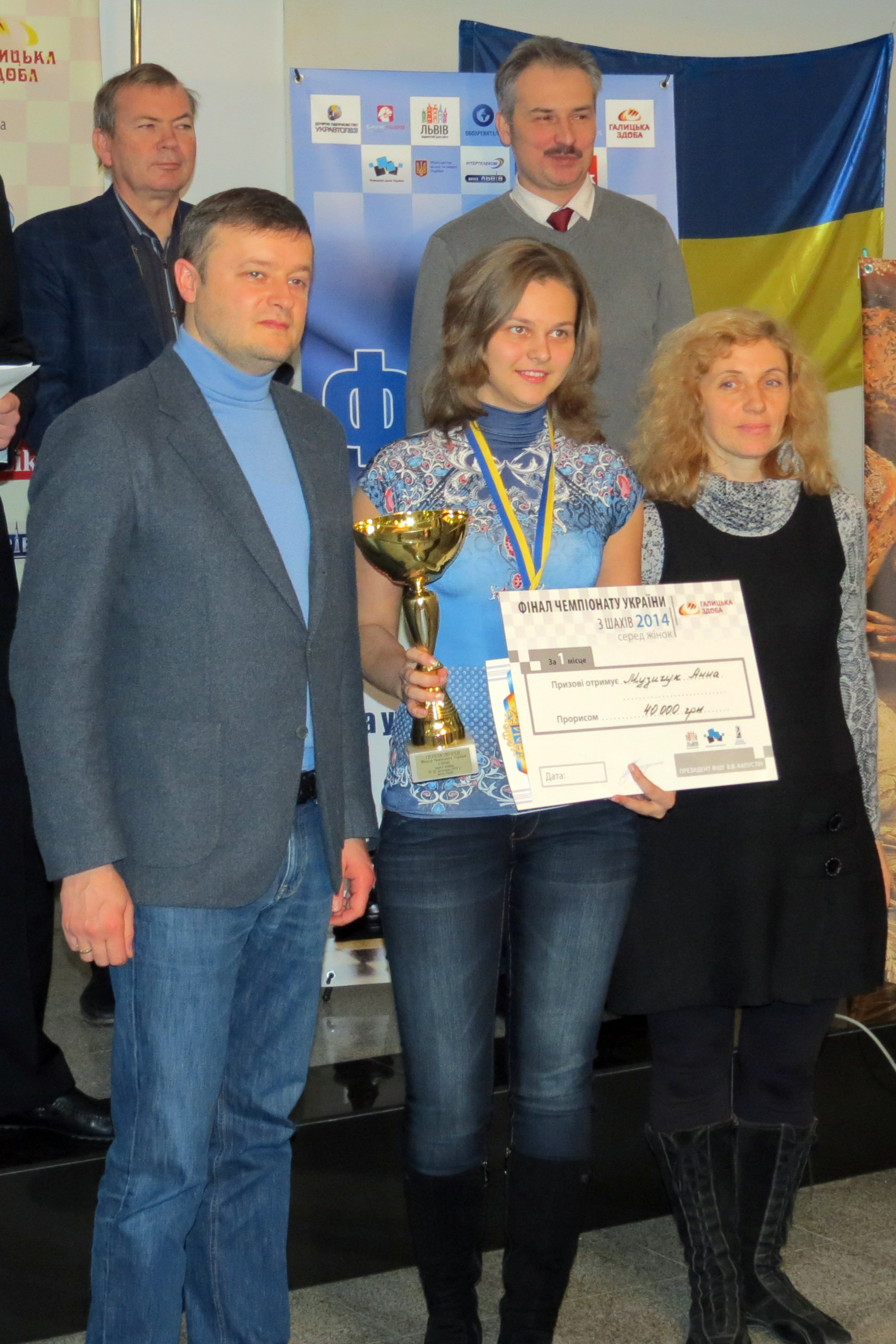 Анна Музичук - переможниця 74-го чемпіонату України серед жінок